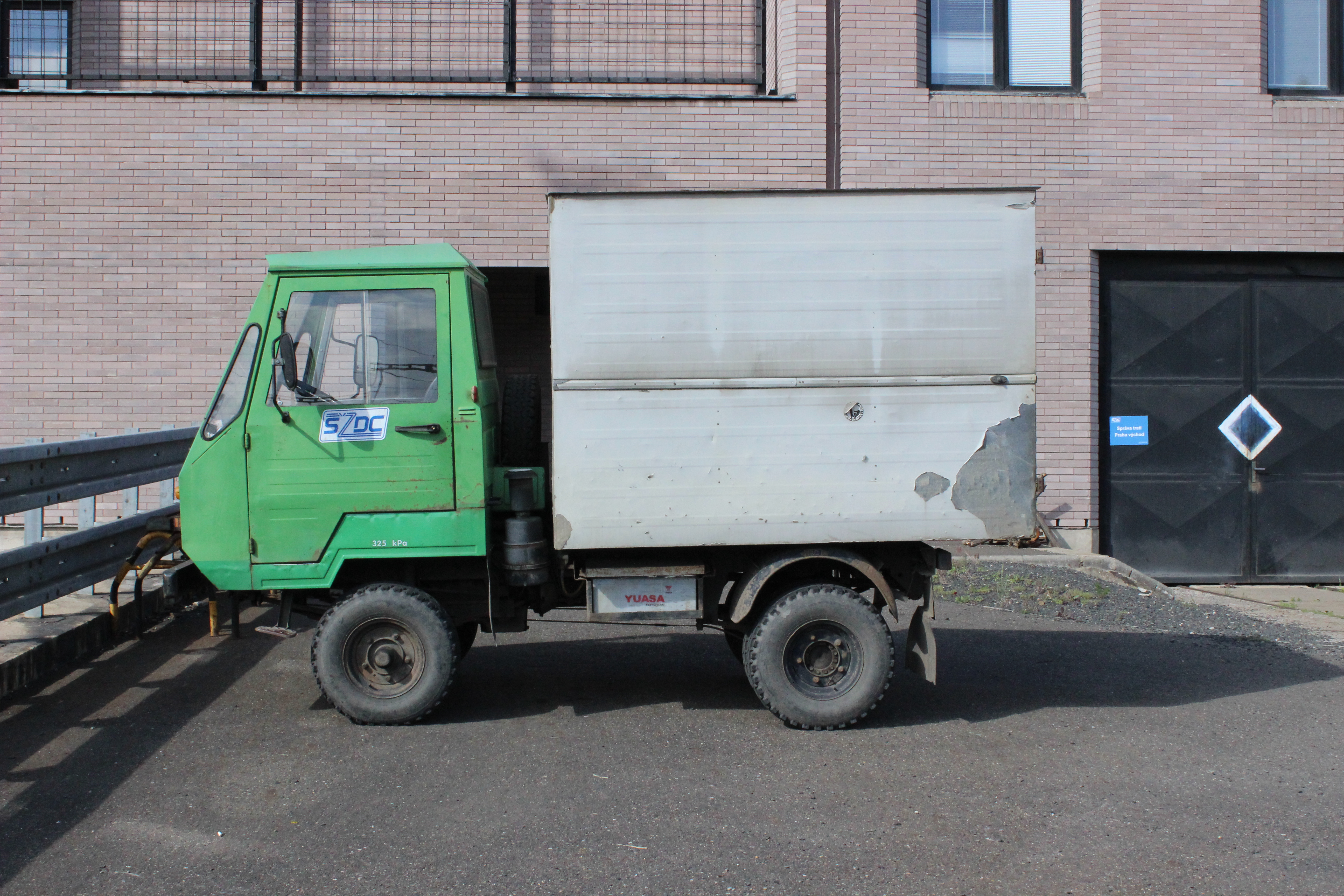 Skříňový vůz Multicar M 25 stojící na pražském Hlavním nádraží.